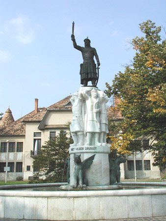 Mátészalka, Hét vezér díszkút (Bíró Lajos alkotása)